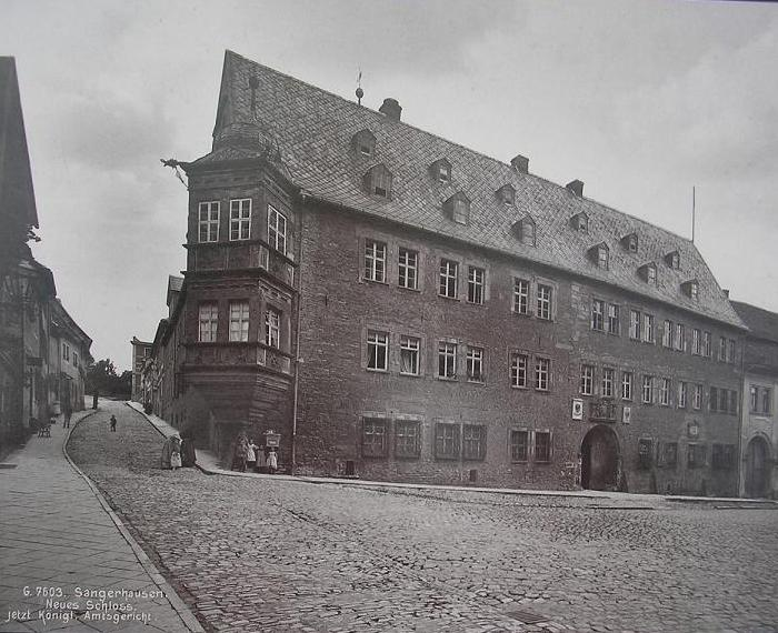 Königliches Amtsgericht in Sangerhausen, vormals das Neue Schloss.